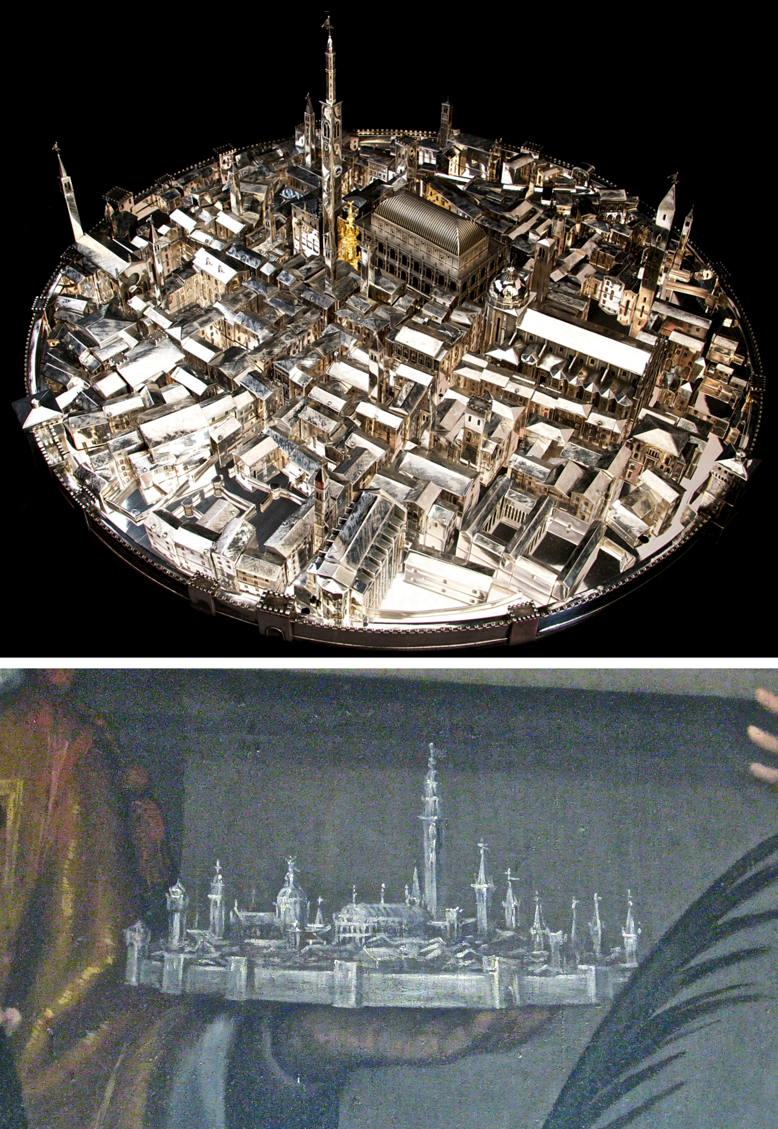 Collage di 2 immagini sul Gioiello di Vicenza (vedi fonte)